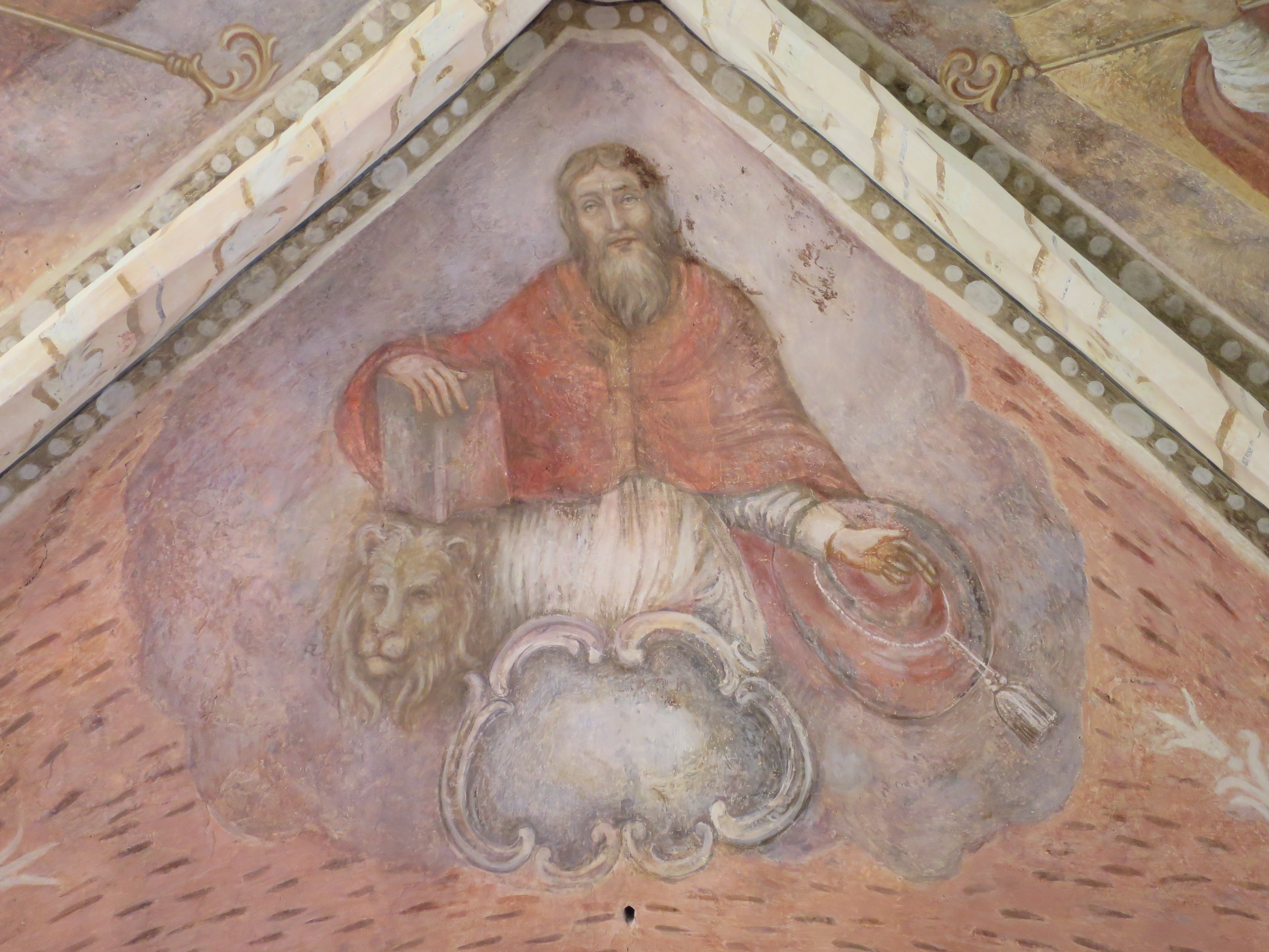 Gotisches Fresco im Chorgewölbe,Evangelist Markus.